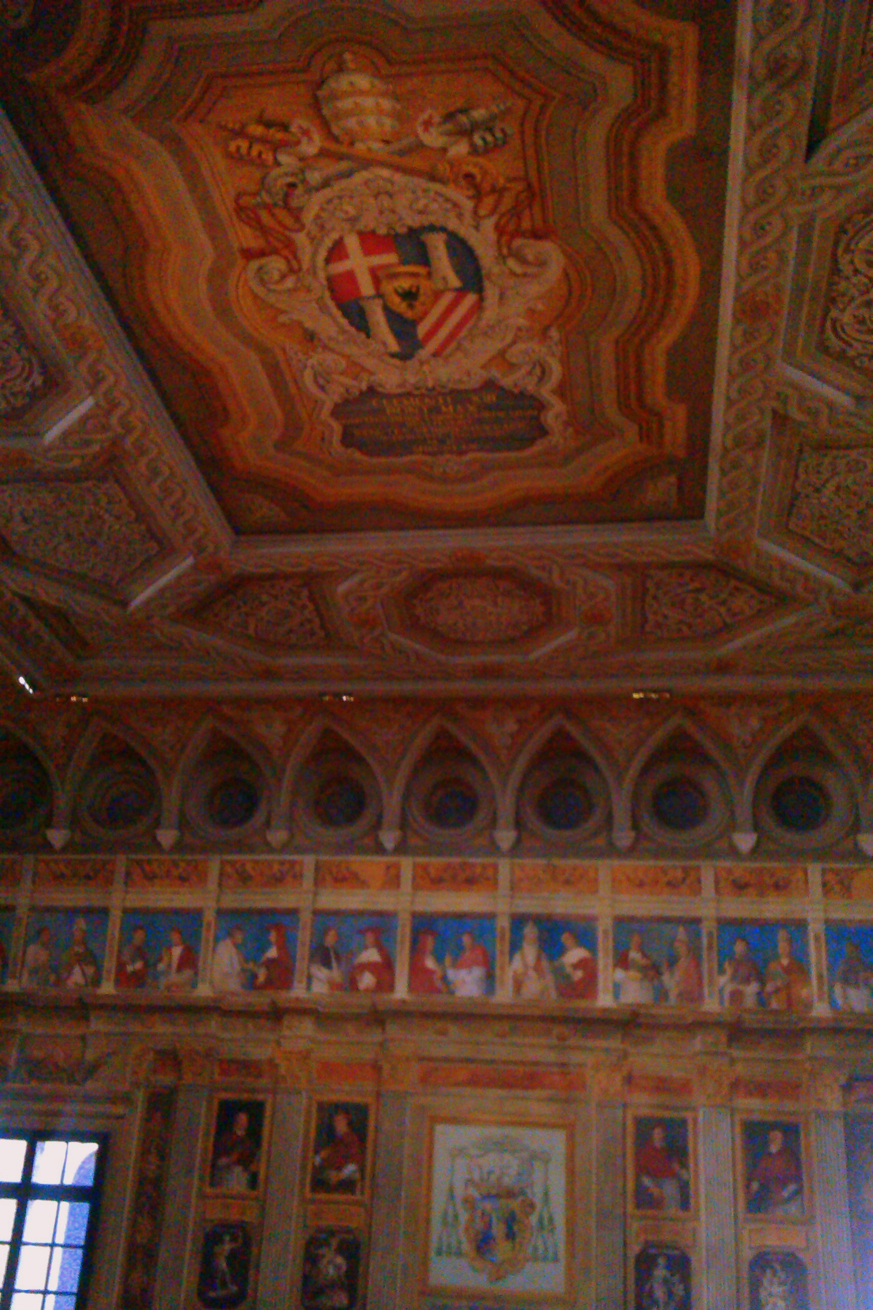 Il Salone dei Vescovi nel Palazzo Vescovile di Padova.